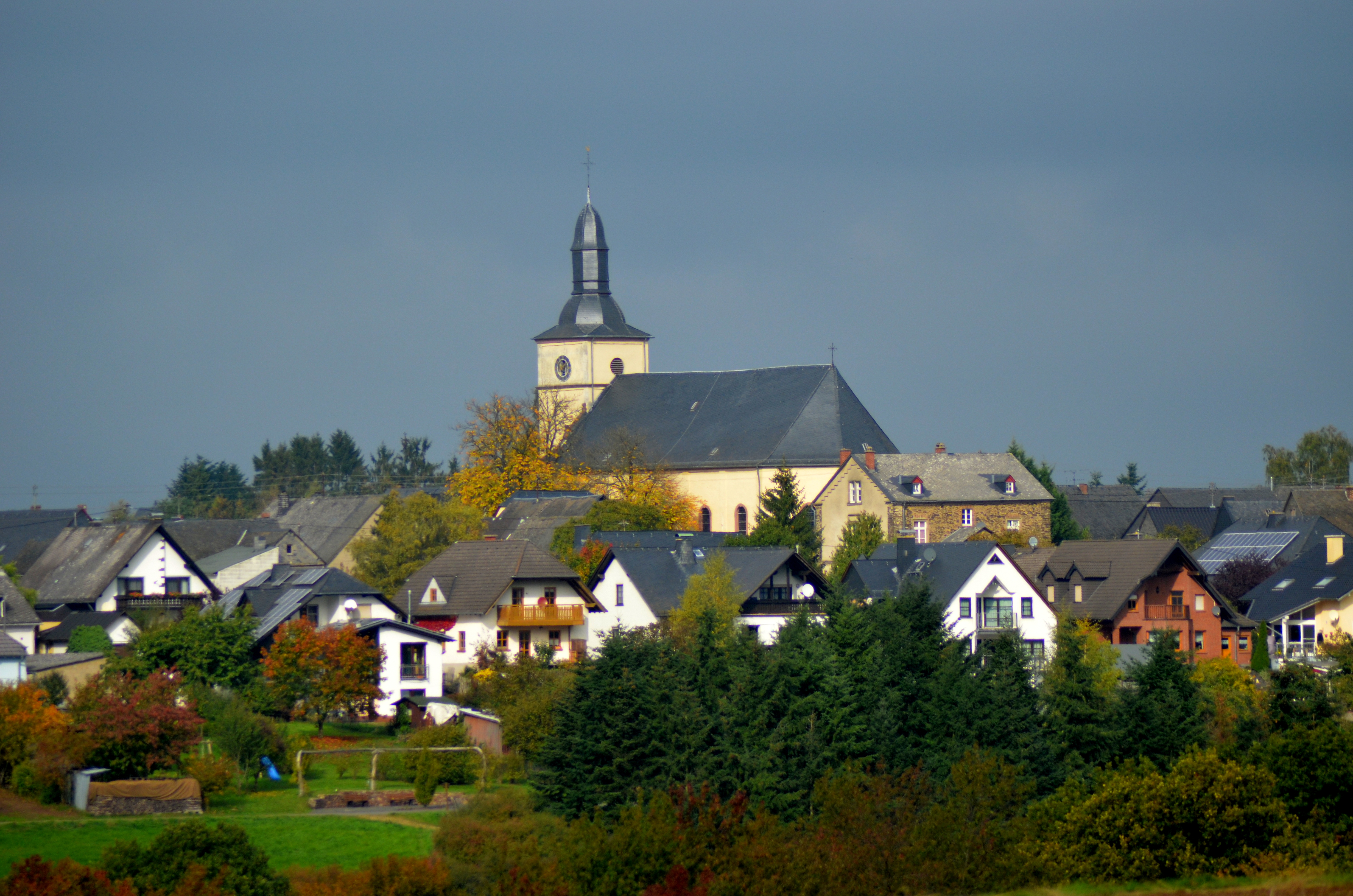 St. Castor, Mörsdorf (Hunsrück), dorpsgezicht